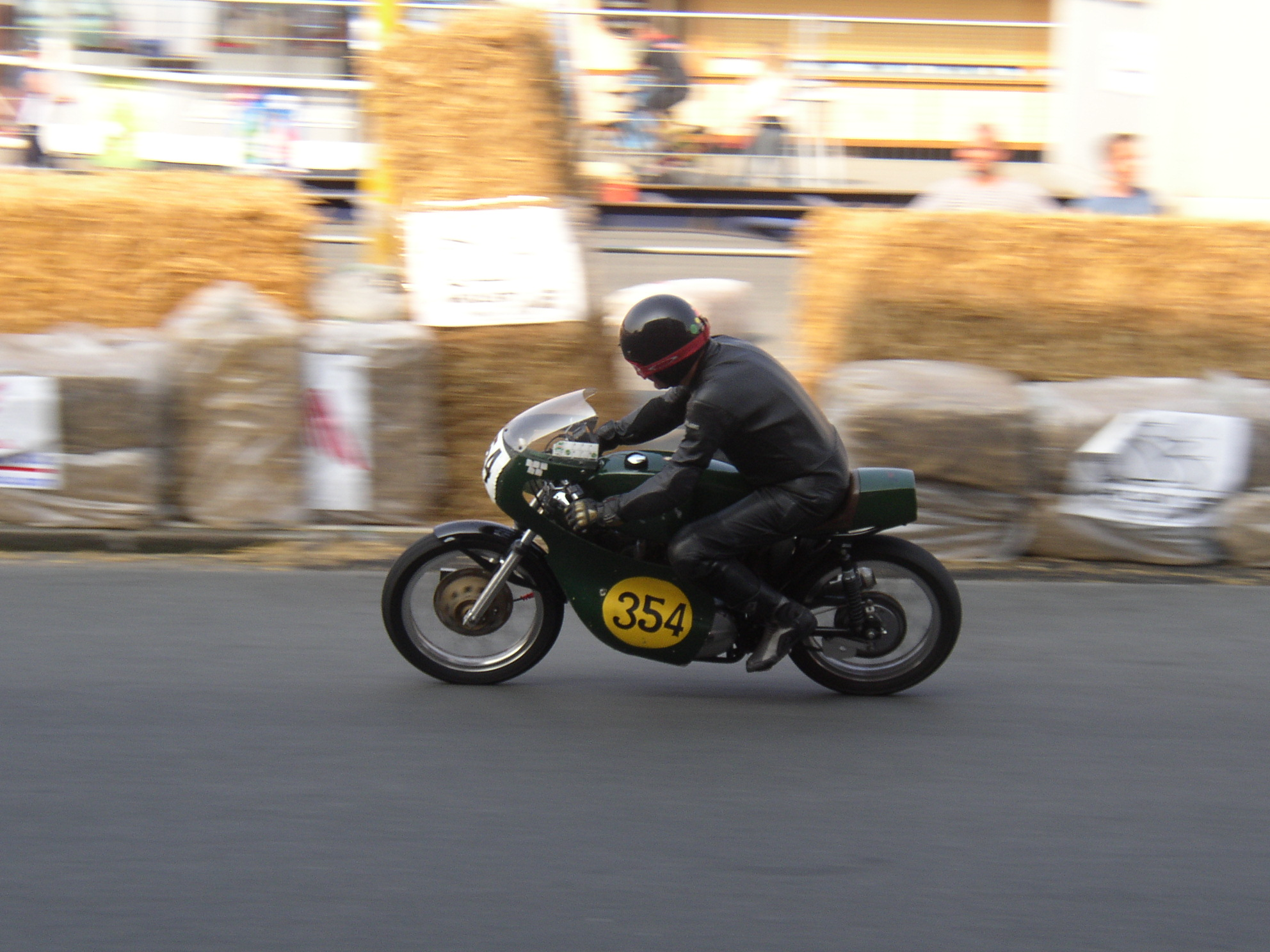 Motorradrennfahrer auf der Straßen-Rennstrecke beim Fischereihafen-Rennen 2003 im Fischereihafen in Bremerhaven, Deutschland.